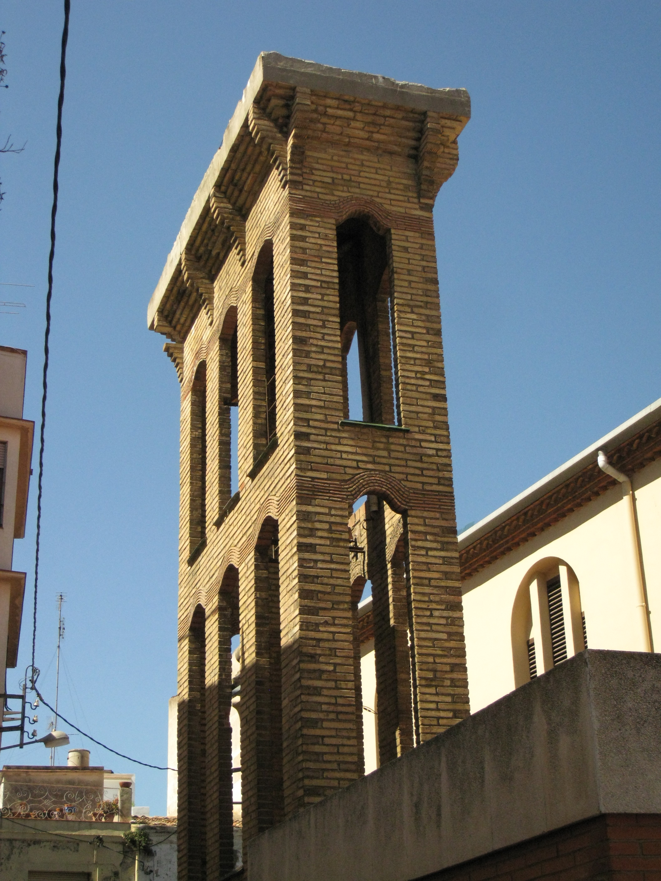 Torretes d'aigua del mercat i l'escorxador municipal (Calella)